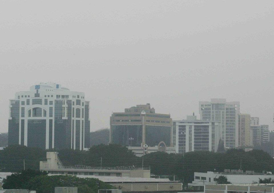 Cielos Con Polvo del Sahara en Puerto Rico.